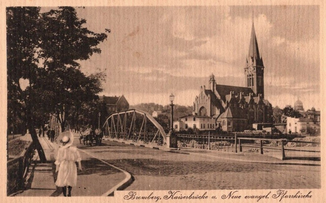 Most bernardyński w Bydgoszczy stalowy (1875-1945)